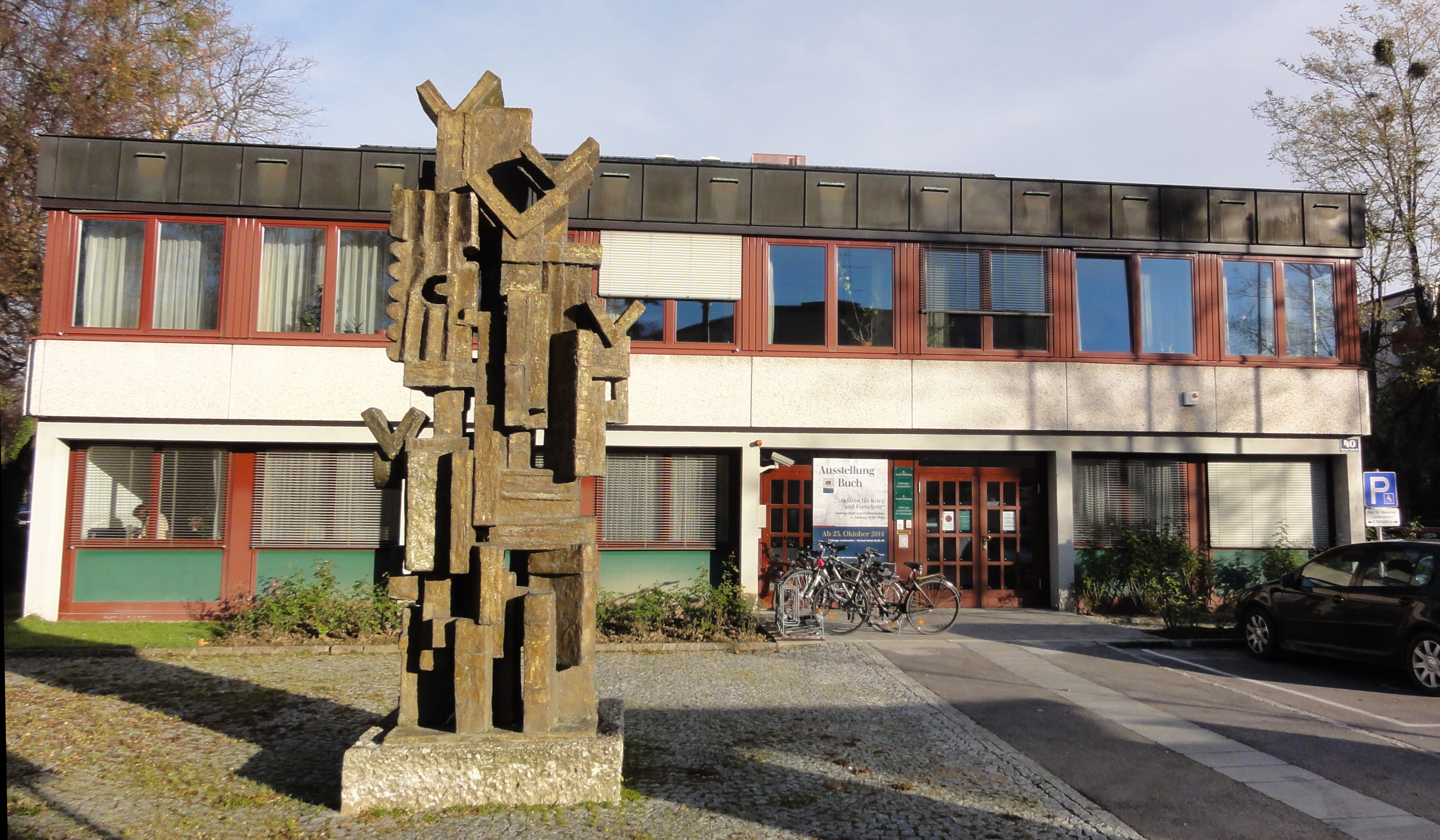 Bücherskulptur von Josef Magnus, 1970, „Bücherturm“ („Bücherberg“ oder „Archivturm“) aus bronziertem Steinguss vor dem Eingang zum Salzburger Landesarchiv.